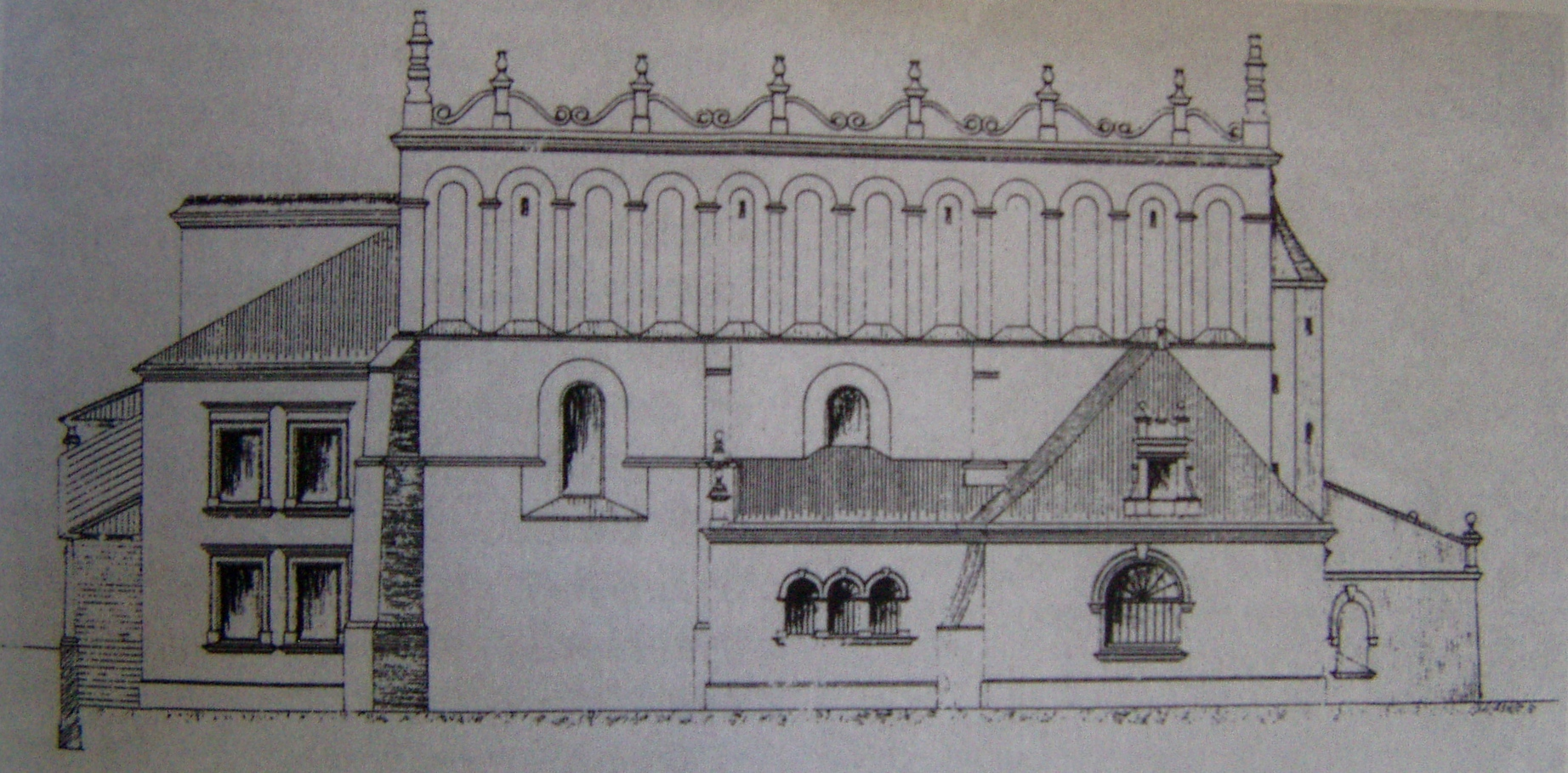 Projekt restauracji Starej Synagogi w Krakowie (1904)